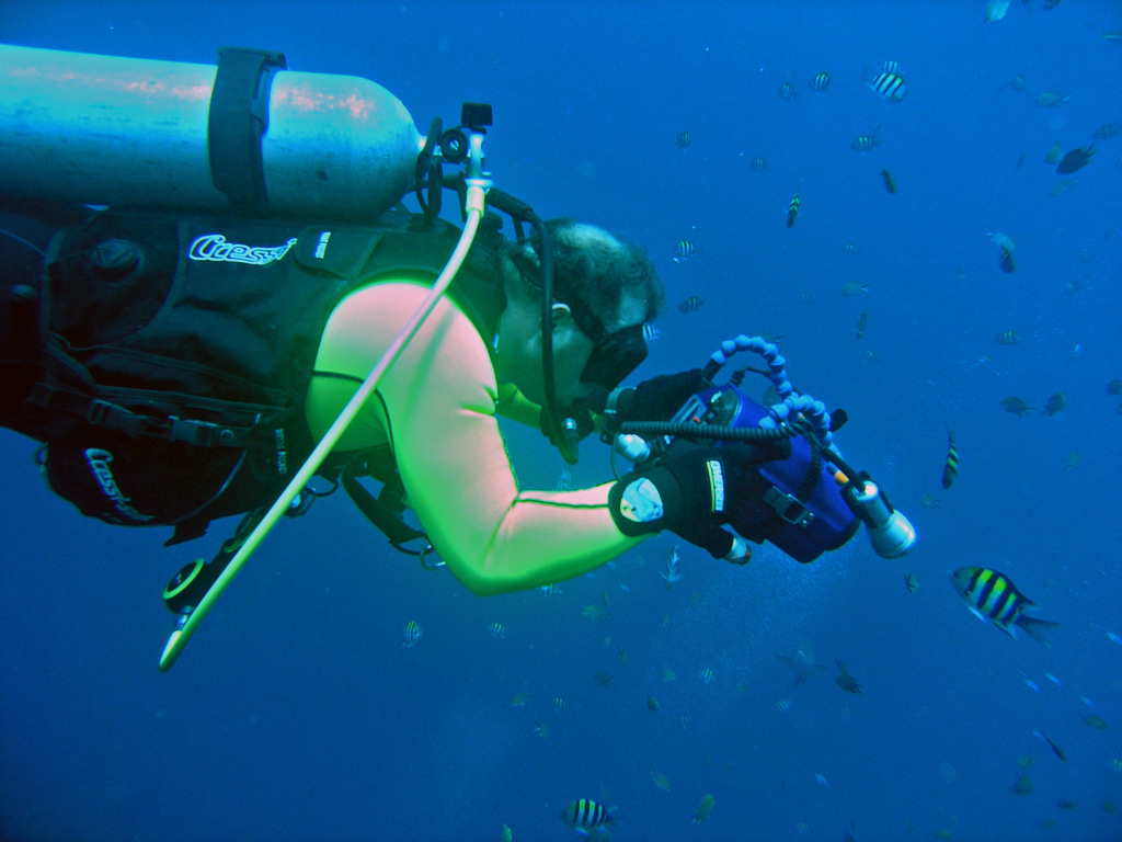 Buceador filmando con cámara de video